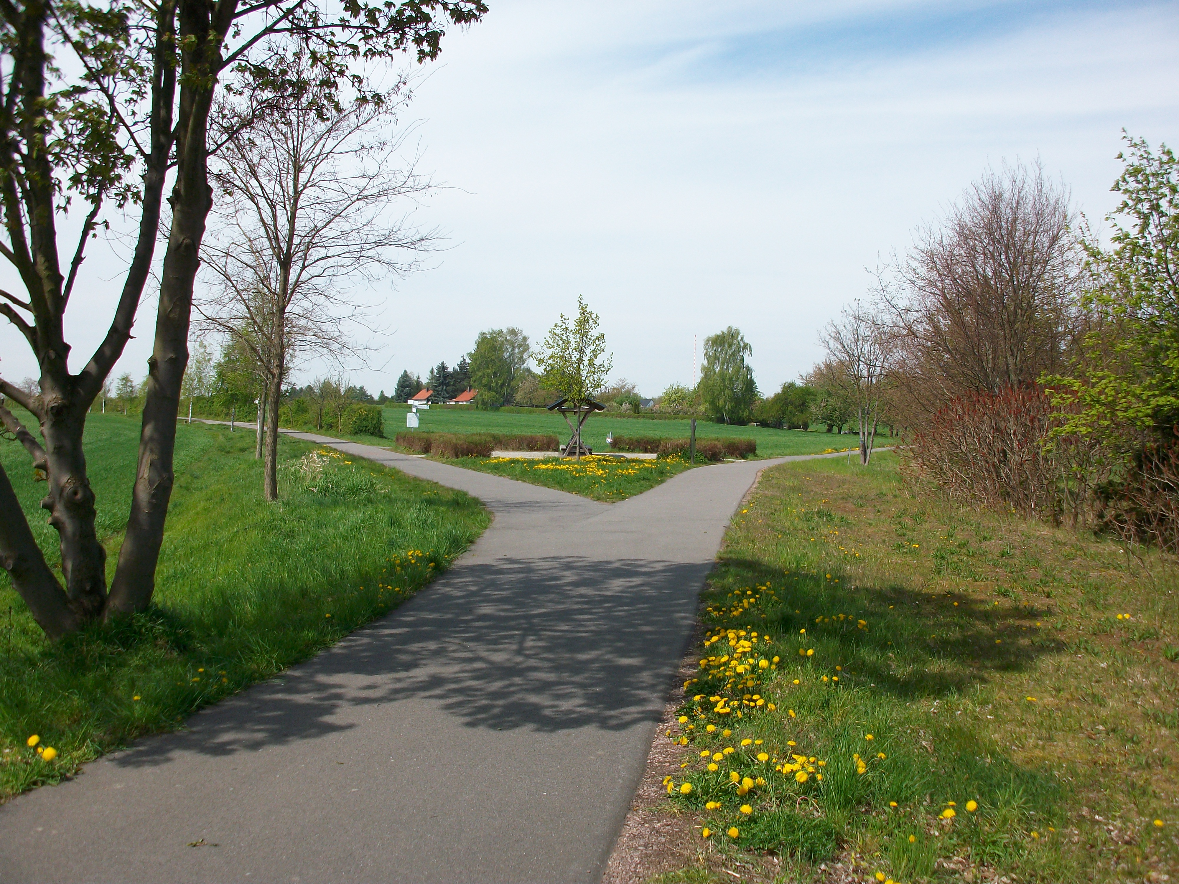 Gabelstelle Saubachtal (2017)